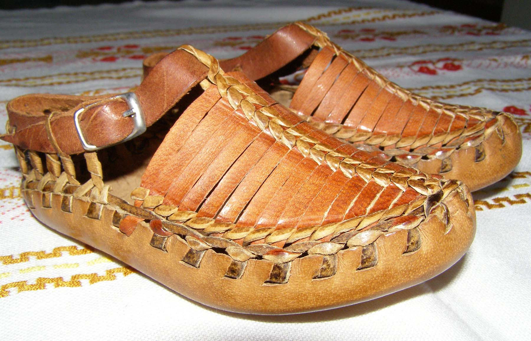 Опaнци sa ravnim krajem